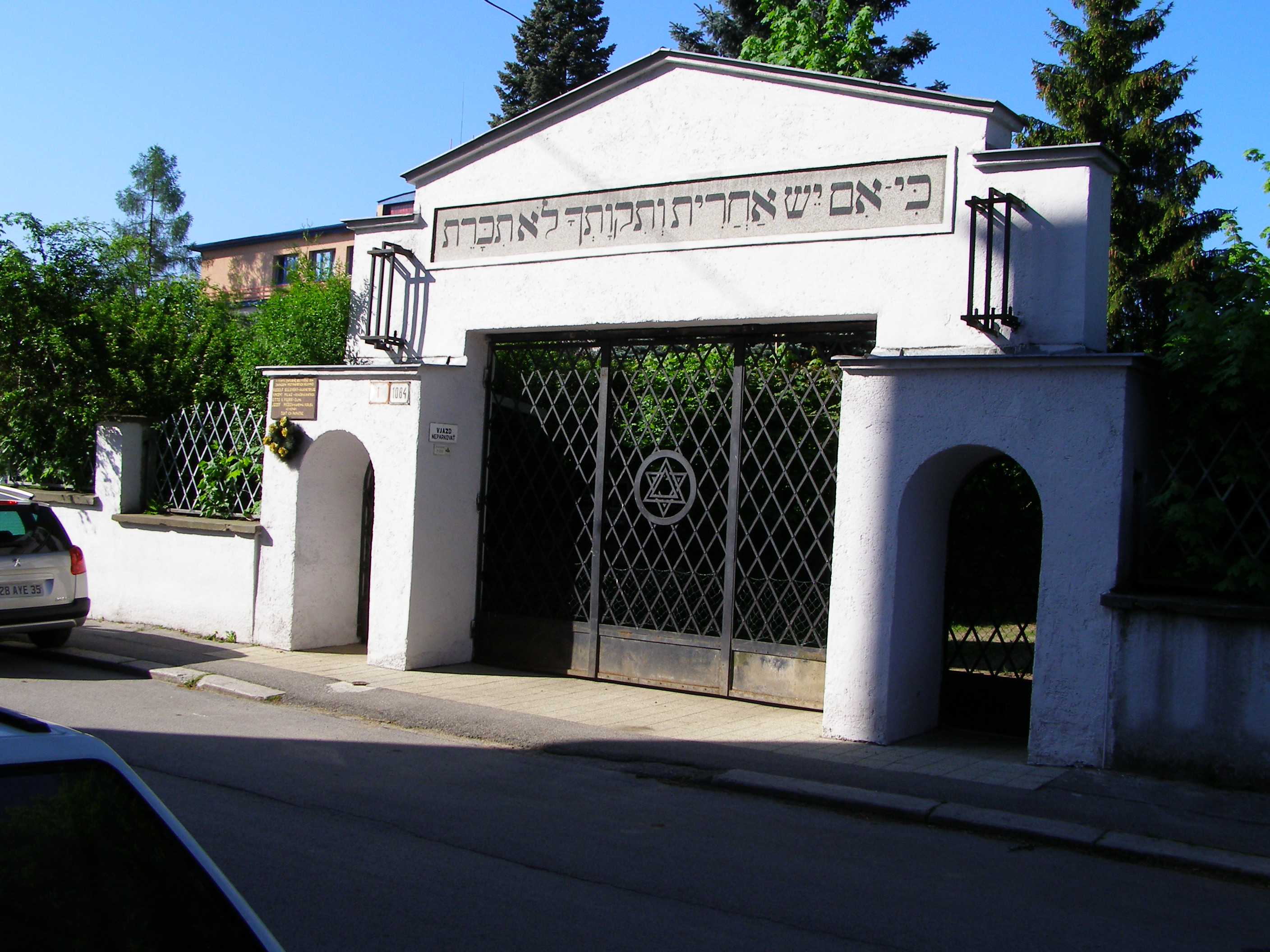 Brána židovského cintorína, Žilina